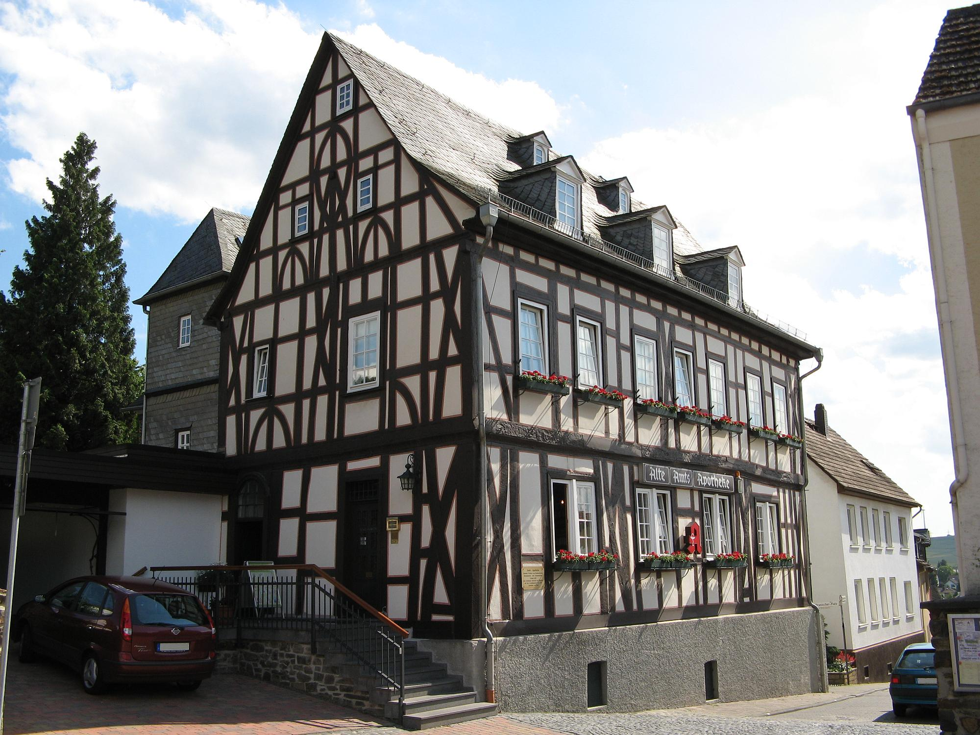 Fachwerkgebäude der „Amtsapotheke“ in Bad Camberg, erbaut 1492 auf Grundmauern von 1330. Apotheke seit 1663